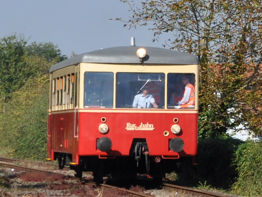 Talbot Taunus auf einer Sonderfahrt der IG Bördebahn in Zülpich im Oktober 2014